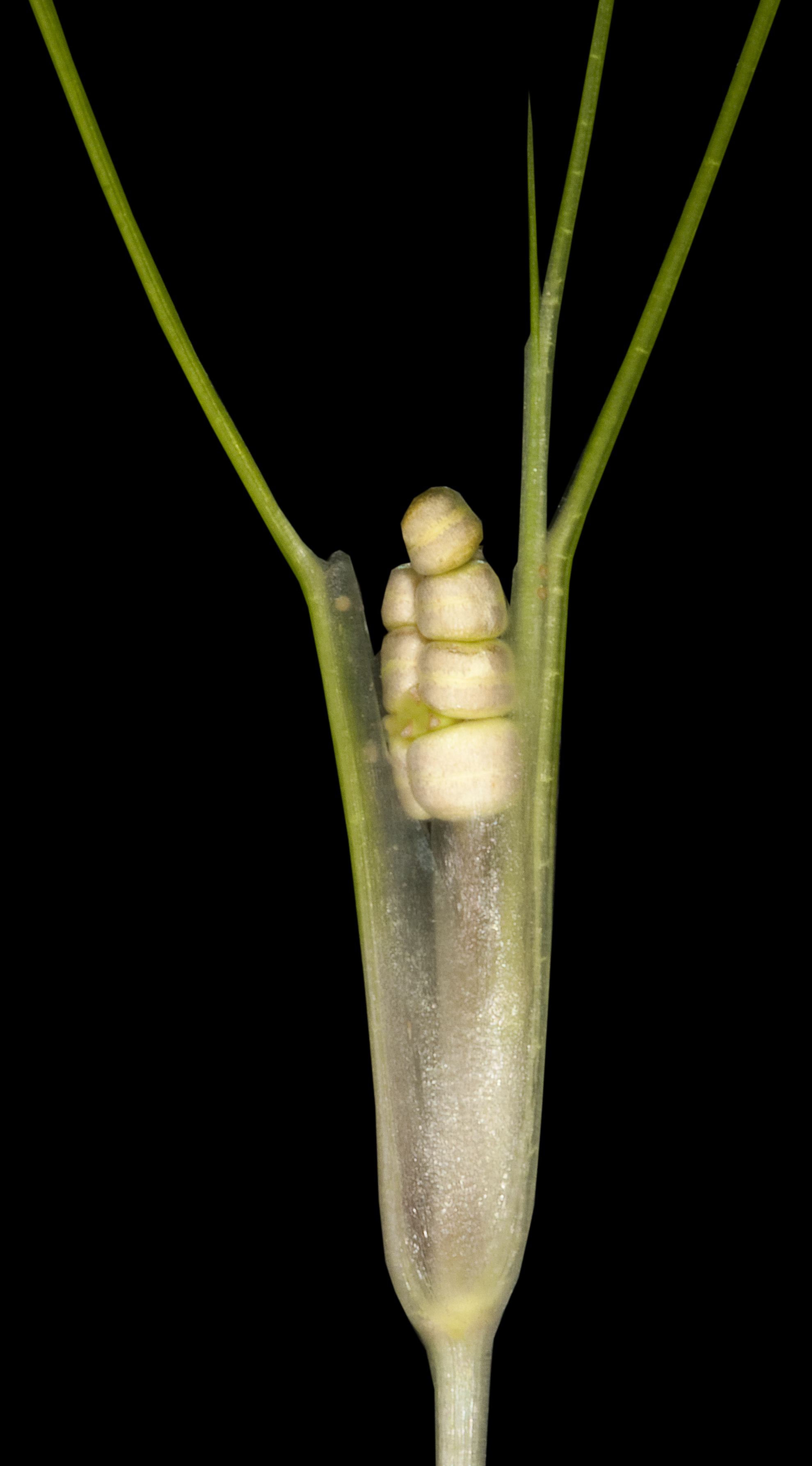 KRT4615